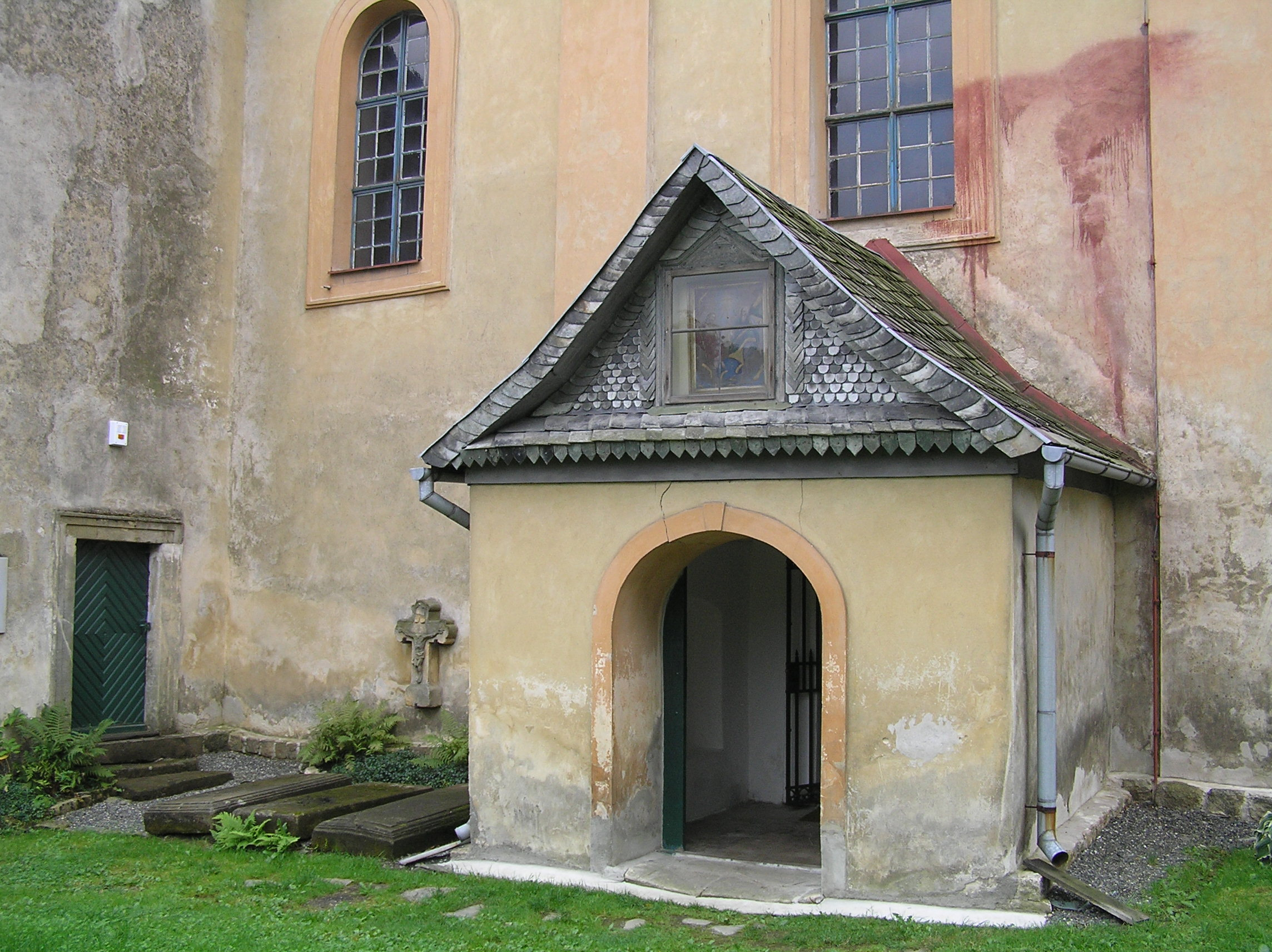 Kostel Nejsvětější Trojice, Bzí (Železný Brod).